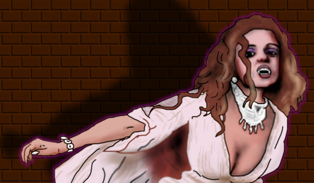 Uma das noivas de Drácula - Van Helsing film.